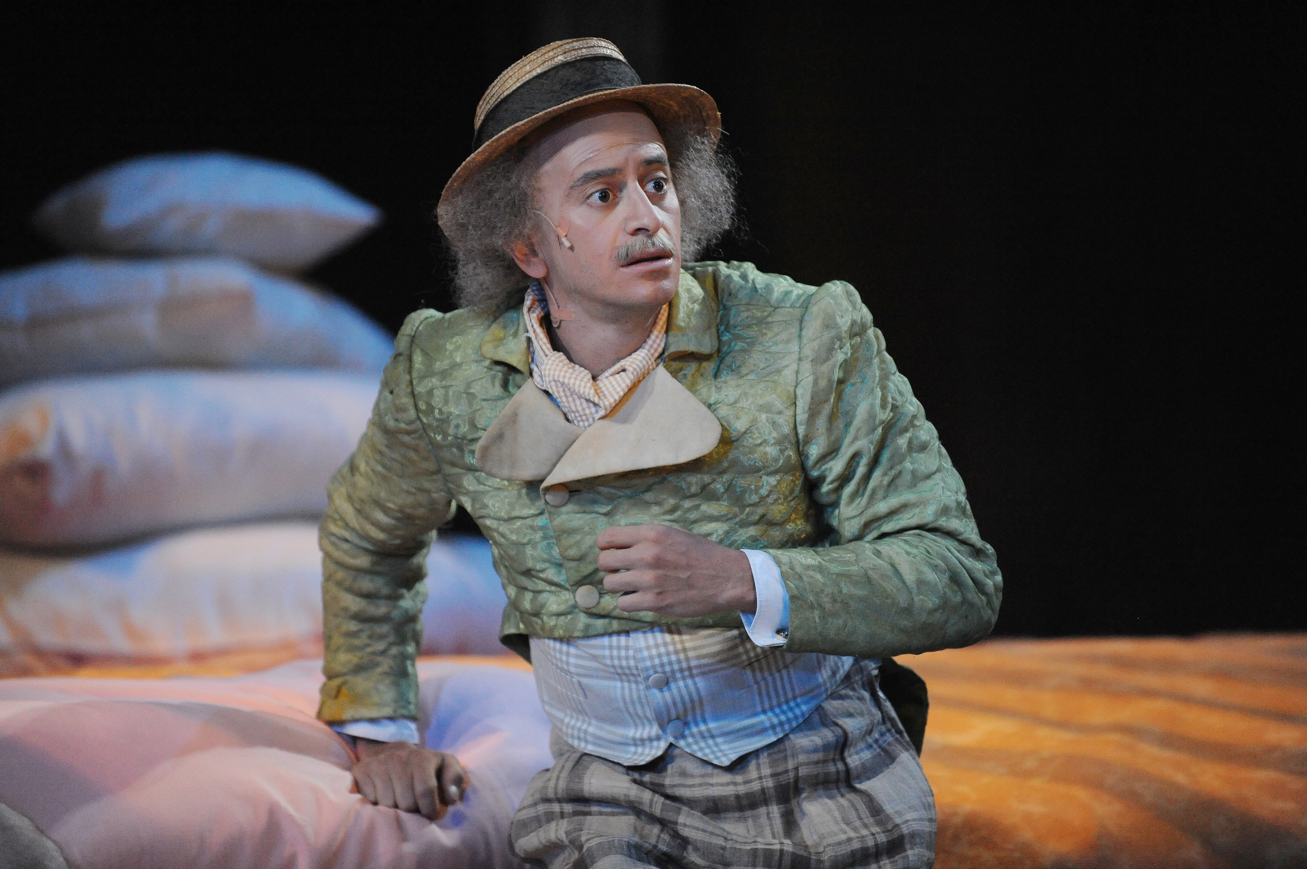 אורי יניב בהצגה בגשר